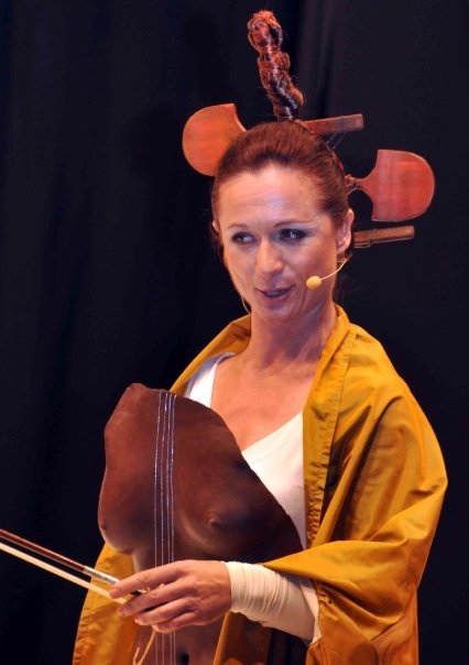 Delphine Haidan au salon du chocolat 2009